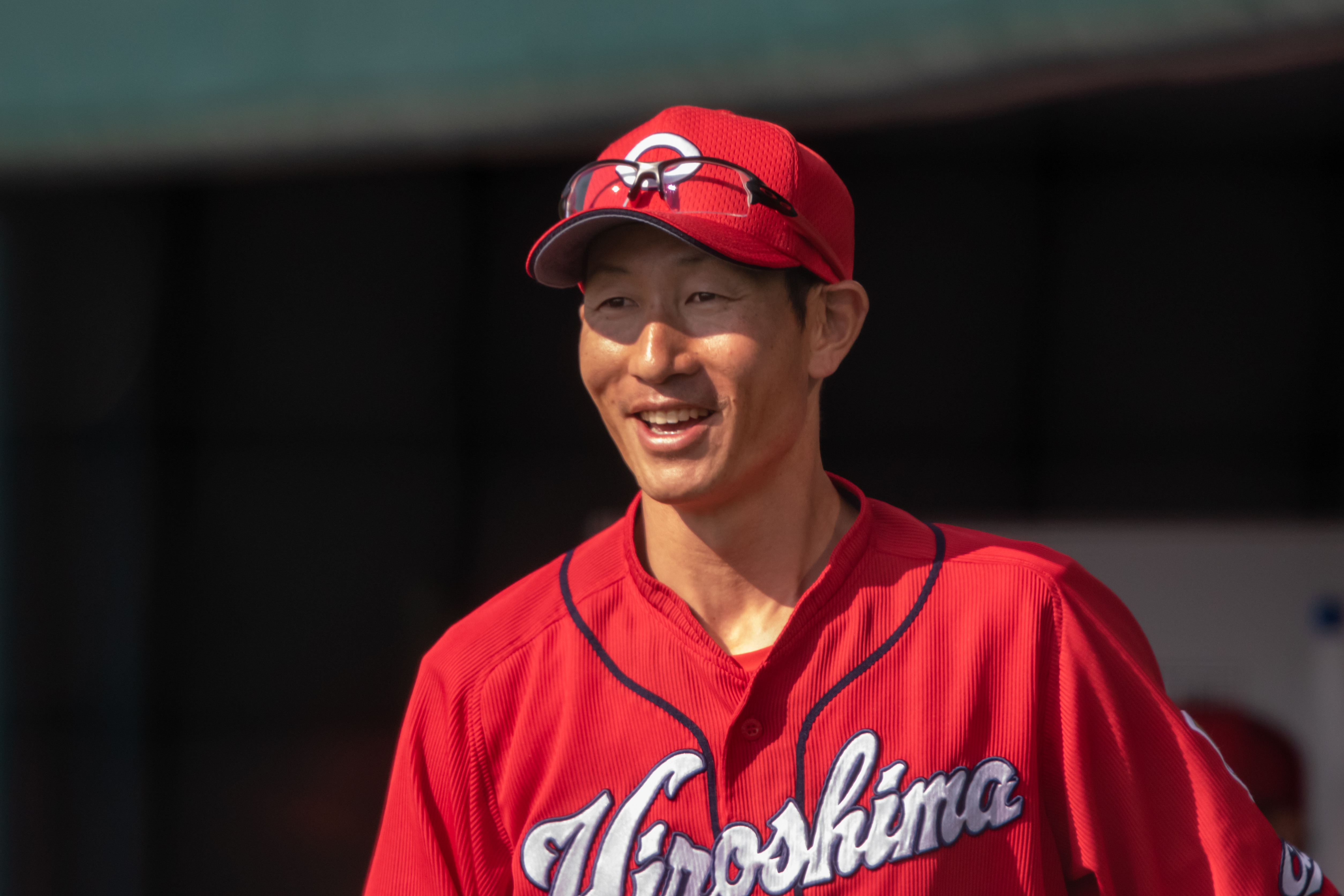 2019年4月18日